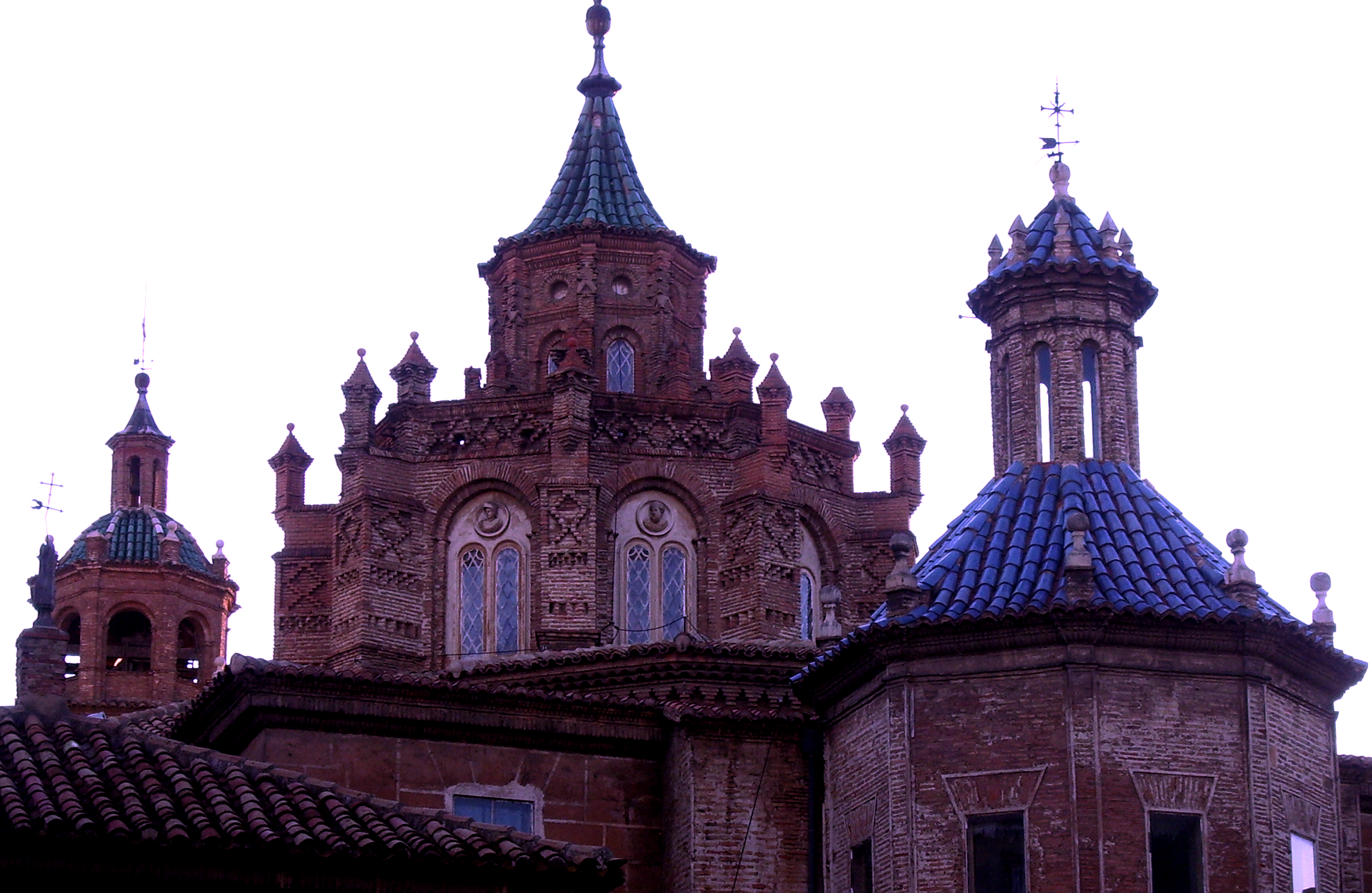 Cúpulas_de_la_Catedral_de_Teruel